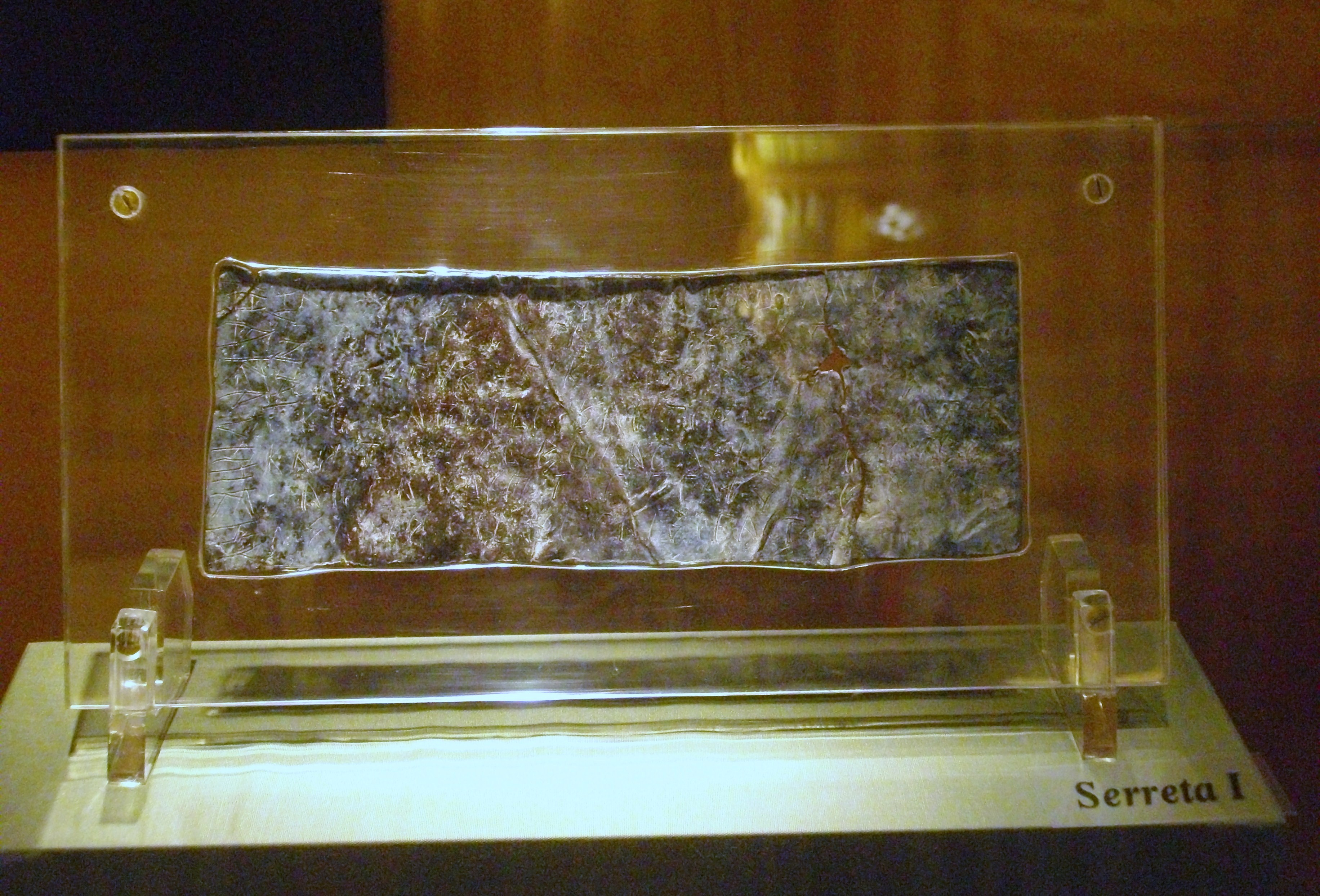 Plom I de la Serreta, escritpura ibèrica. Museu Arqueològic Municipal d'Alcoi.